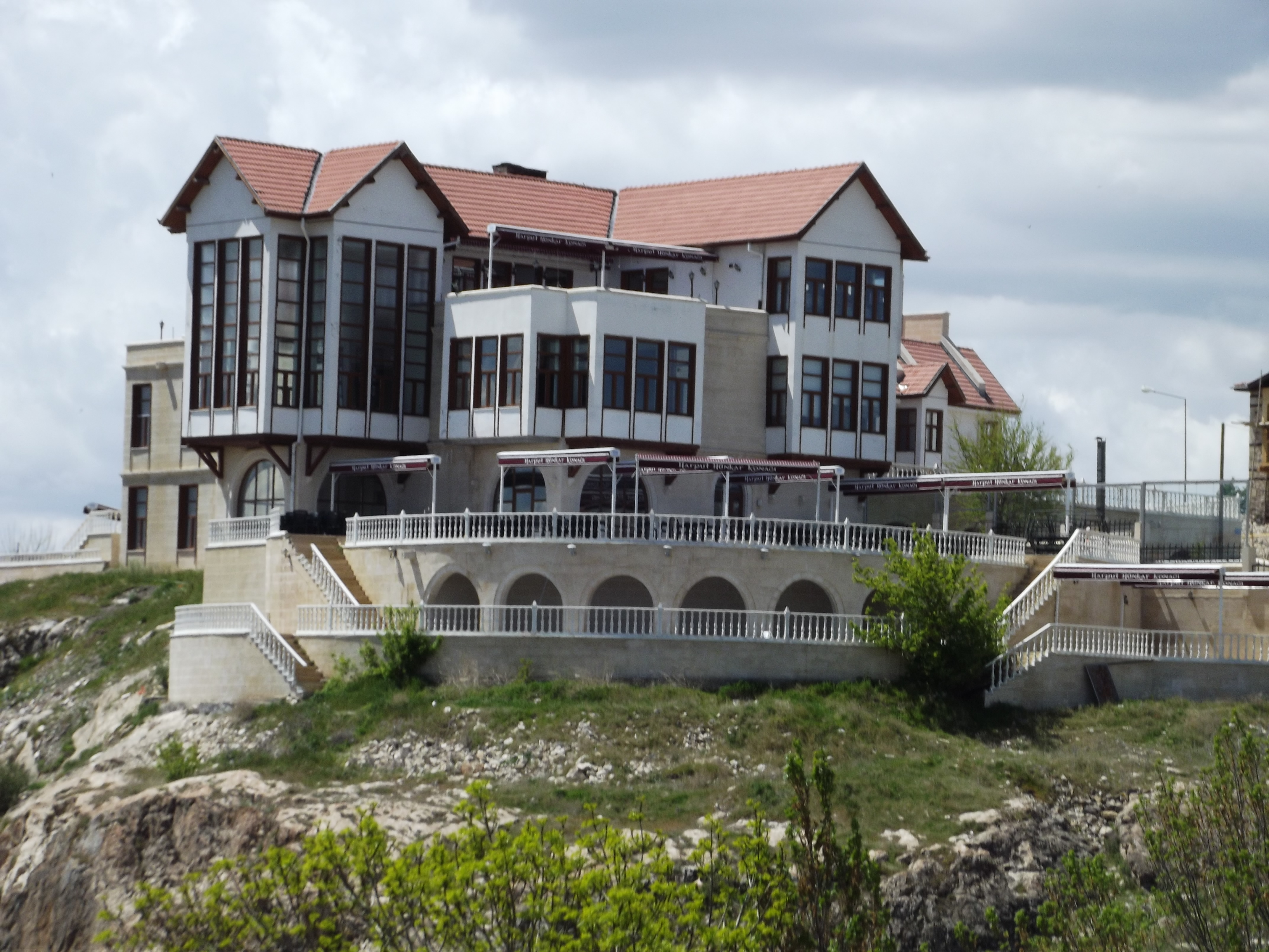 Harput